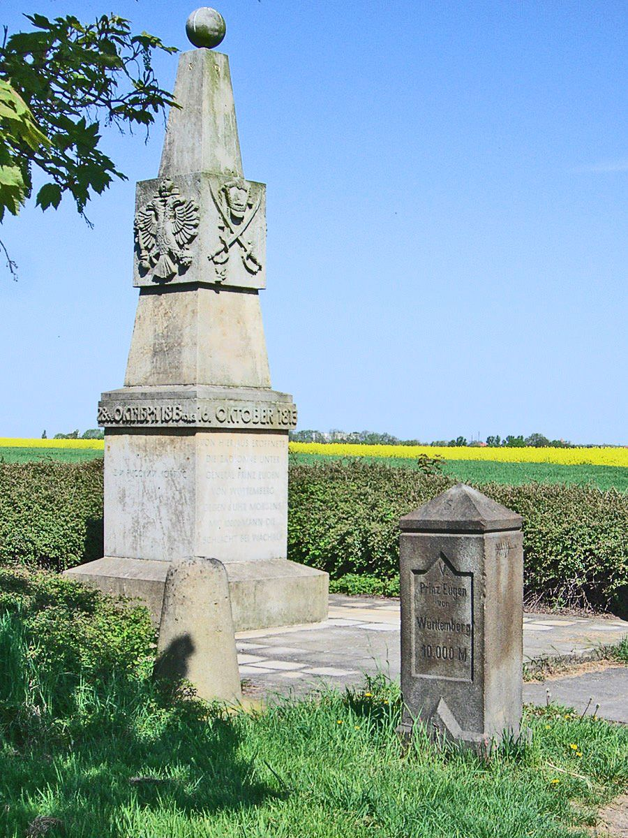 Apelstein Nr. 2 - Zur Erinnerung an die Völkerschlacht bei Leipzig Standort: Straße Güldengossa - Liebertwolkwitz, 1 km nördlich von Güldengossa, neben Russisch-Preußischem Denkmal